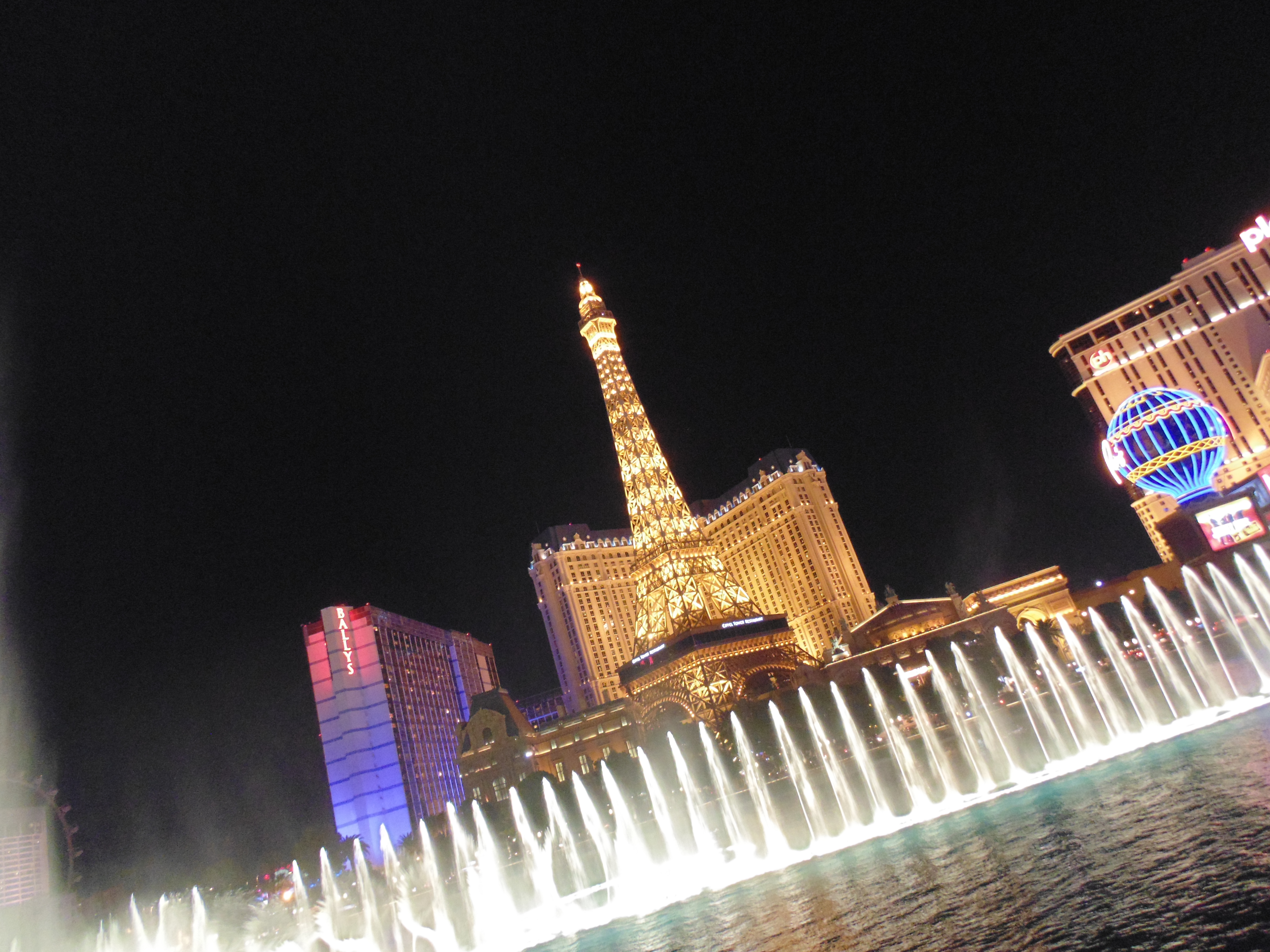 Espectáculo bellagio fountains.